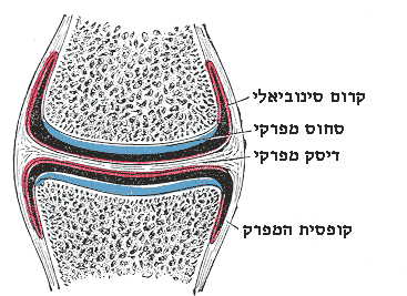 מפרק סינוביאלי